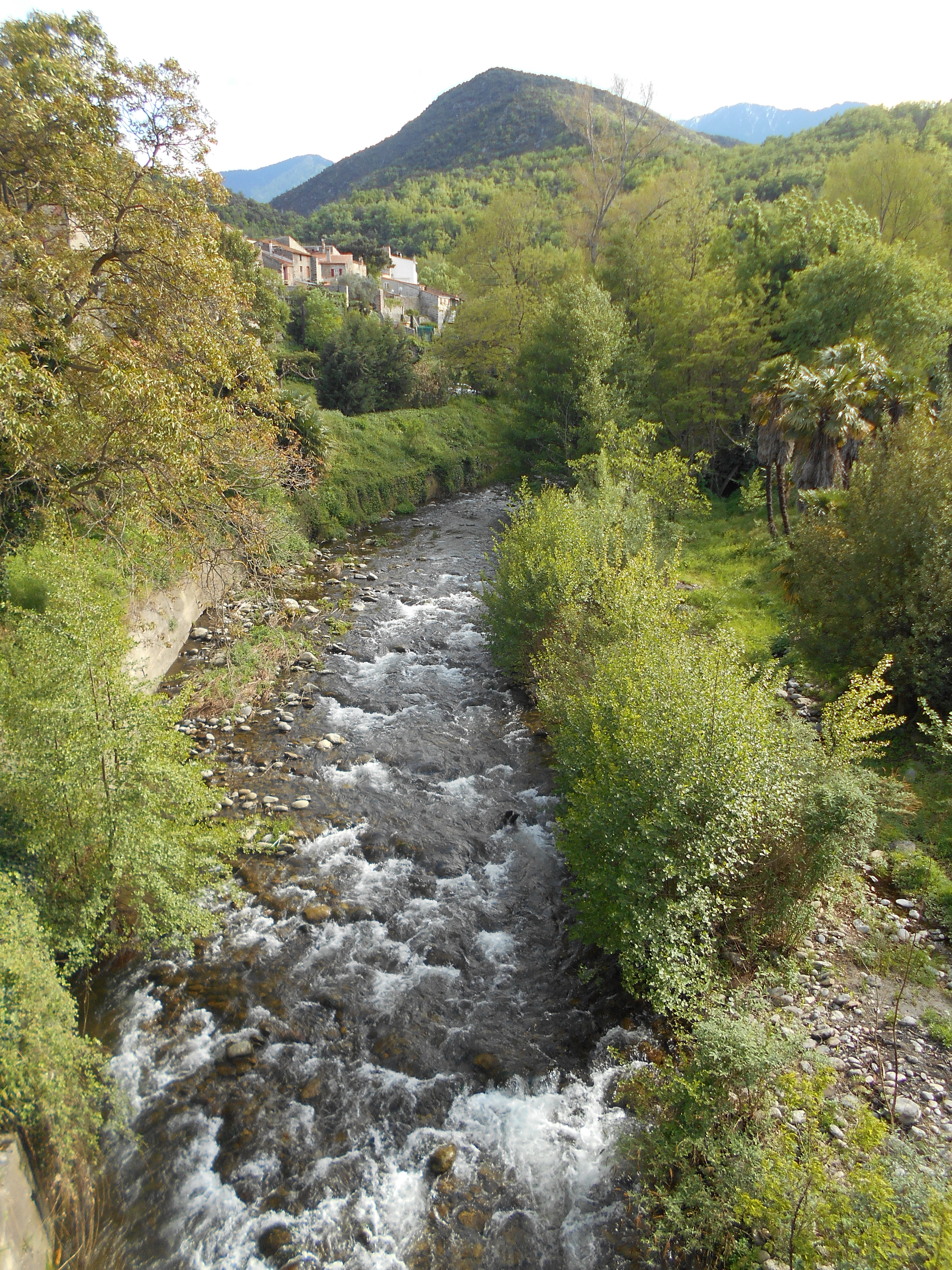 La Llentillà a Finestret